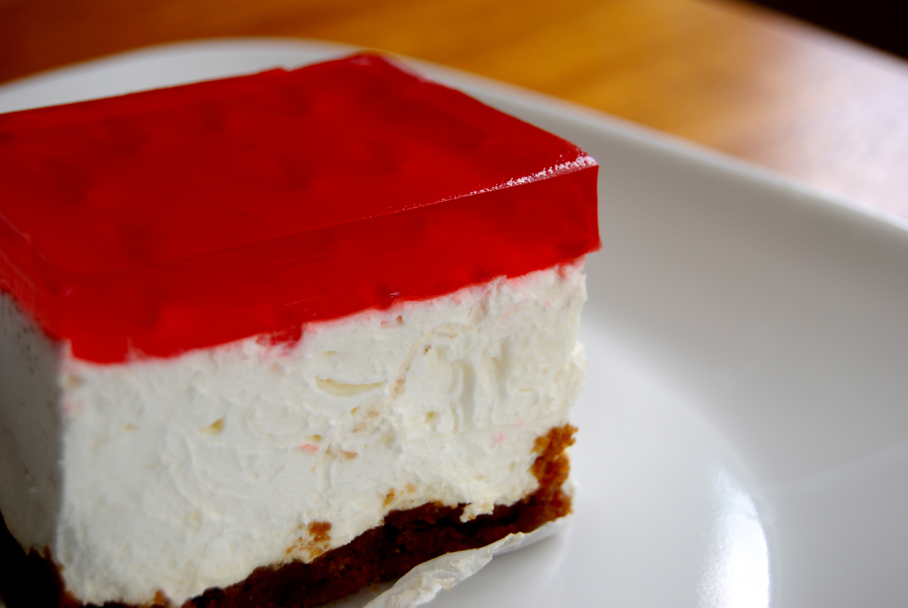 jell-o cream cheese square